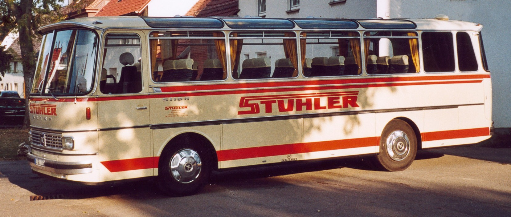 Kässbohrer Setra S110H Reisebus aus dem Jahr 1972 mit Luftfederung, WC, Küche und Schlafsessel